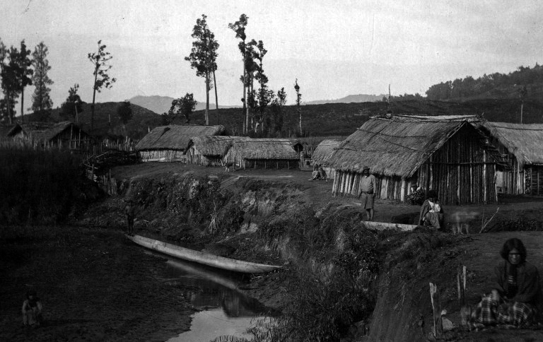 Village Maori (Maori Village)